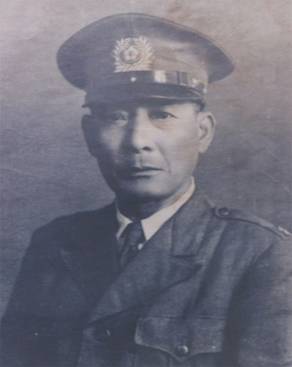 宋 虎聲（ソン・ホソン、송호성、1889年? - 1959年3月24日）